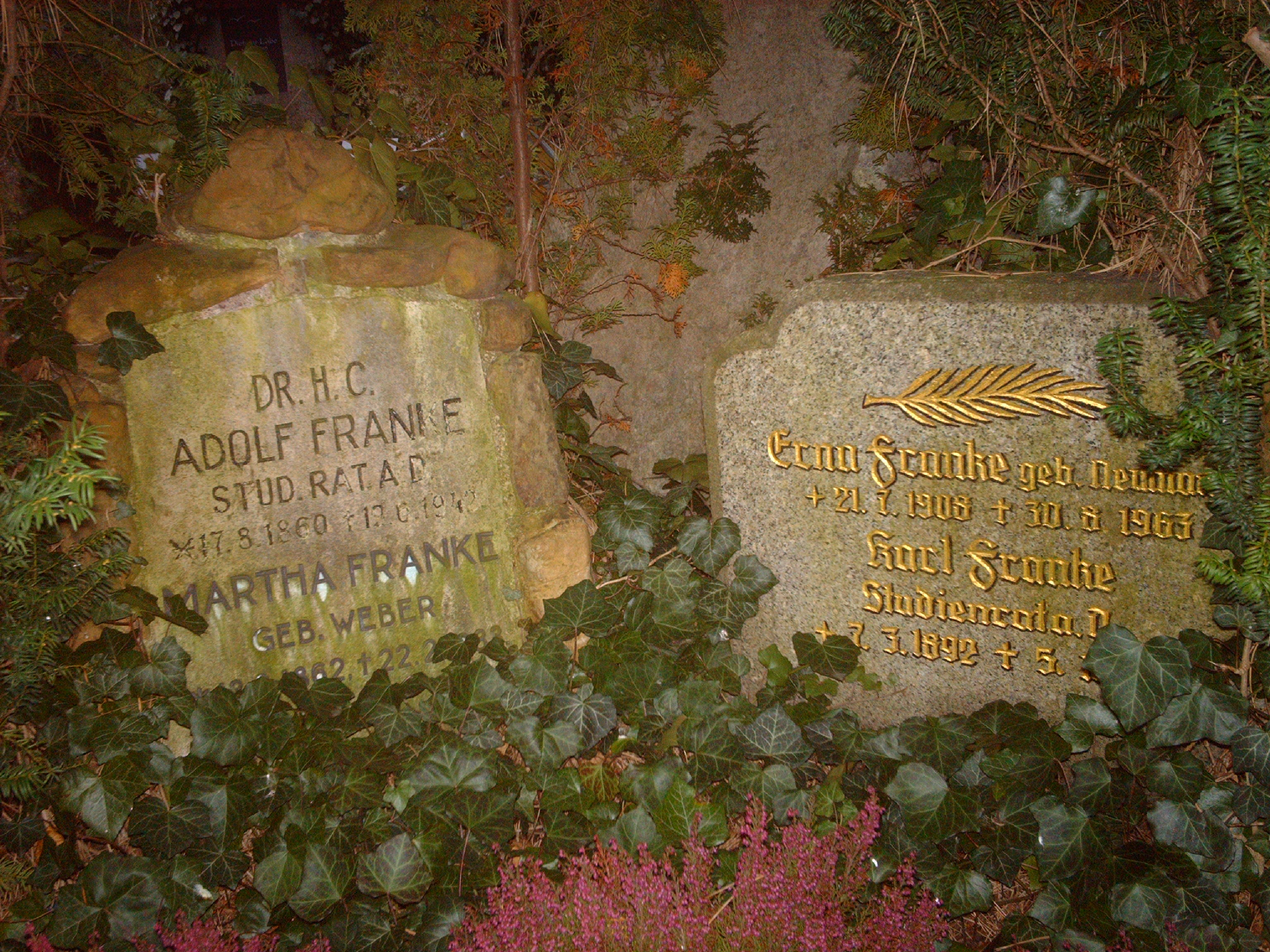 Grabmal des deutschen Geologen Adolf Franke in Arnstadt.